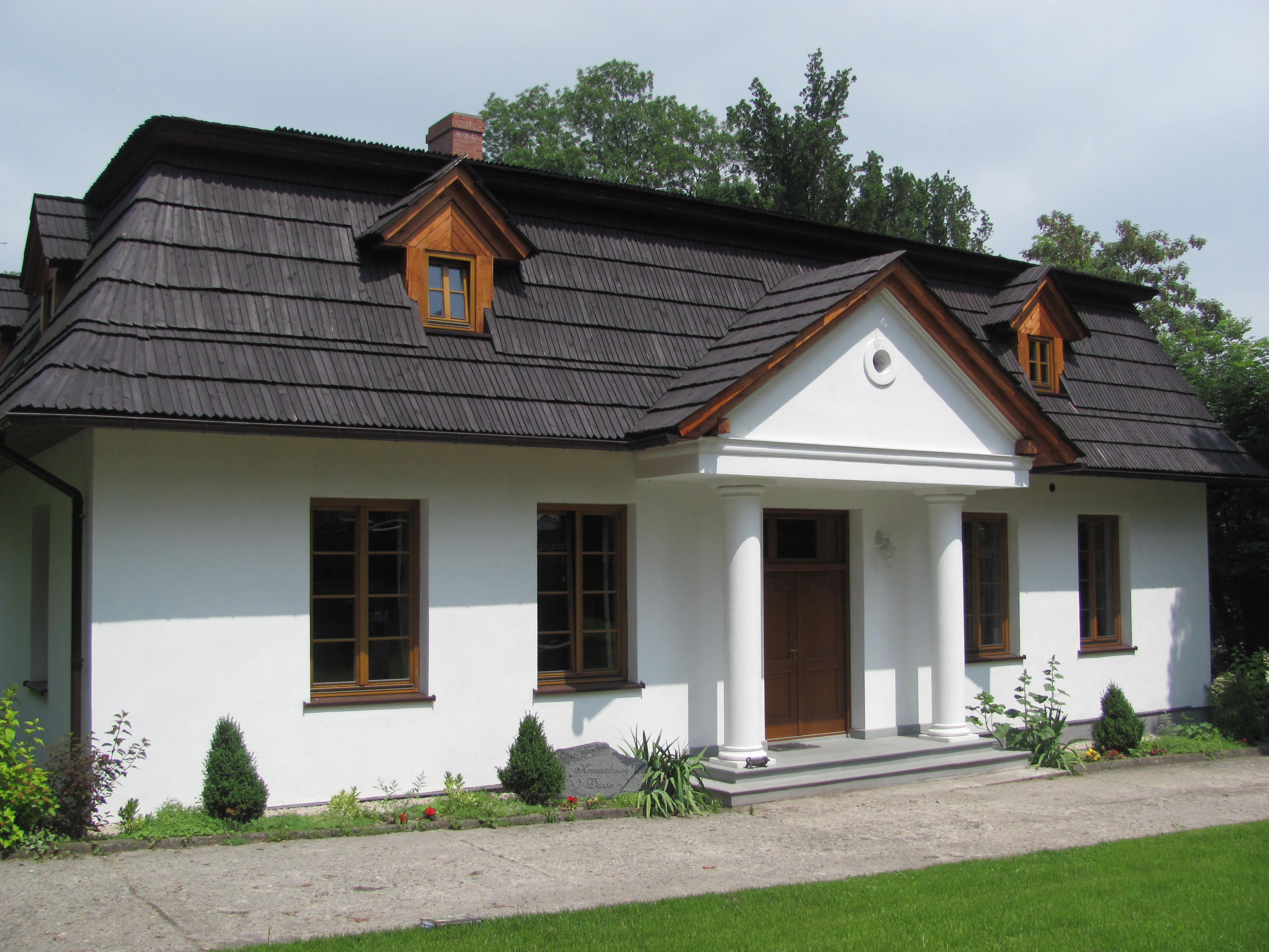 Majkowice - kościół